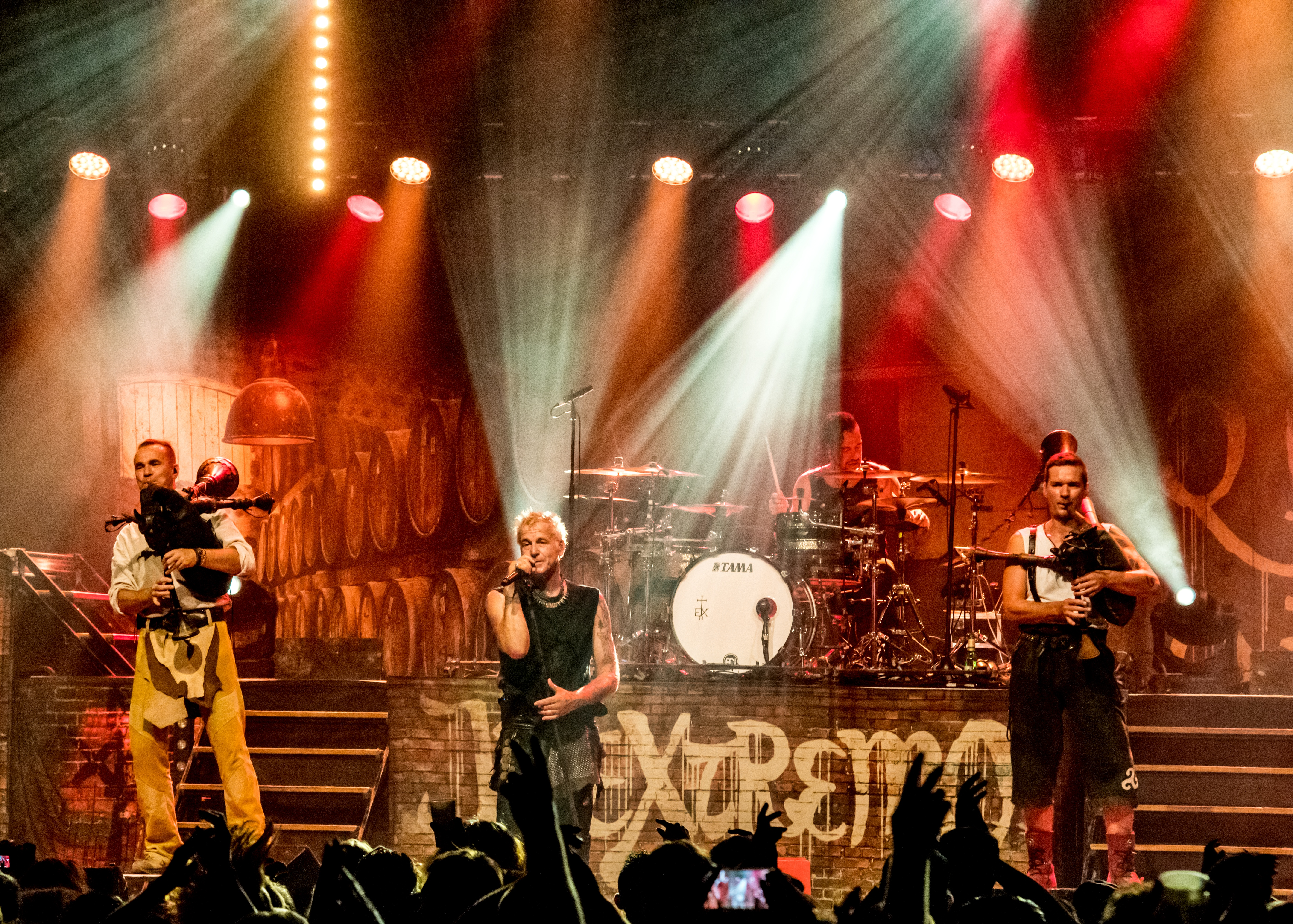 Bilder vom Zelt Musik Festival 2018 in Freiburg im Breisgau In Extremo am 29.07.2018 im Zirkuszelt